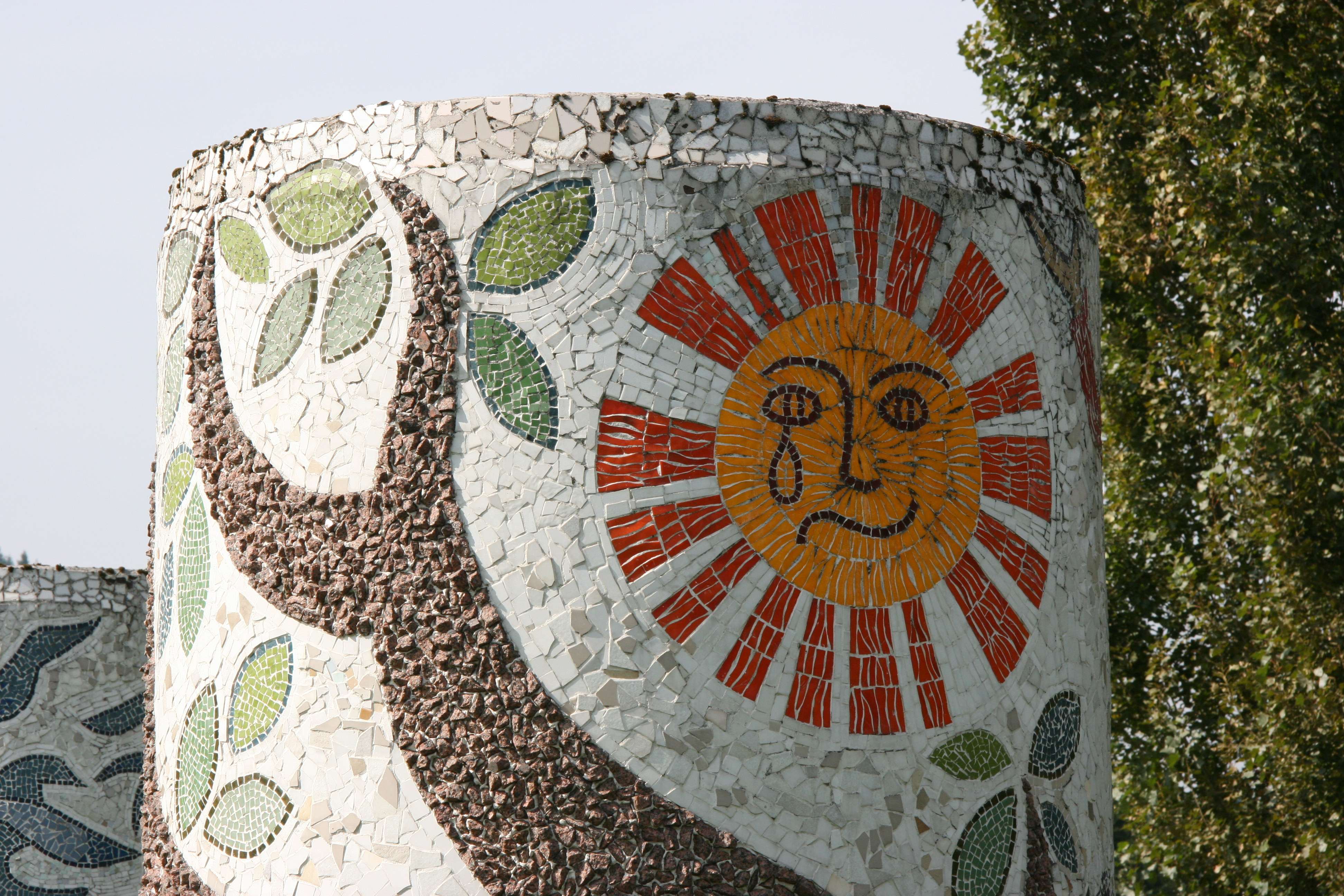 soleil